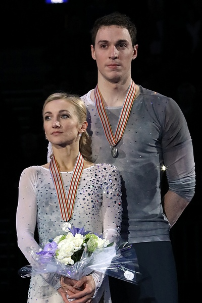 Алена Савченко и Бруно Массо на подиуме чемпионата мира 2017года